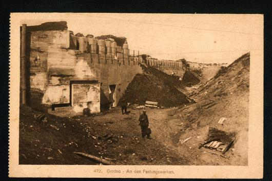 Нямецкая паштоўка з выявай Гродзенскай крэпасці (канец XIX - пачатак XX стагоддзяў)